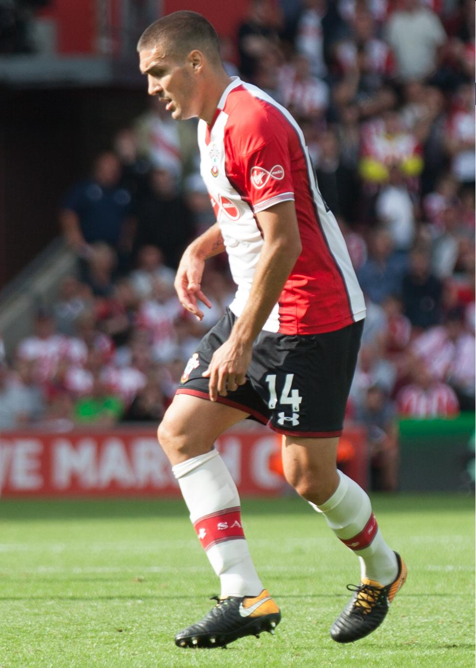 Oriol Romeu